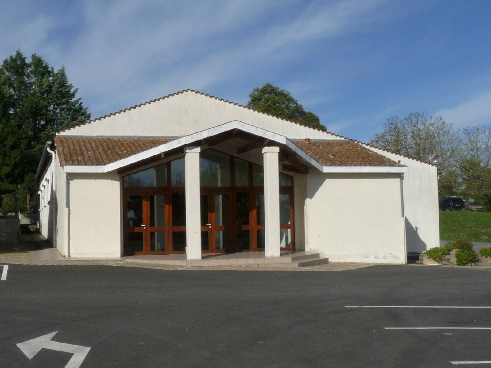 Salle des fêtes, Ozillac, Charente-Maritime, France